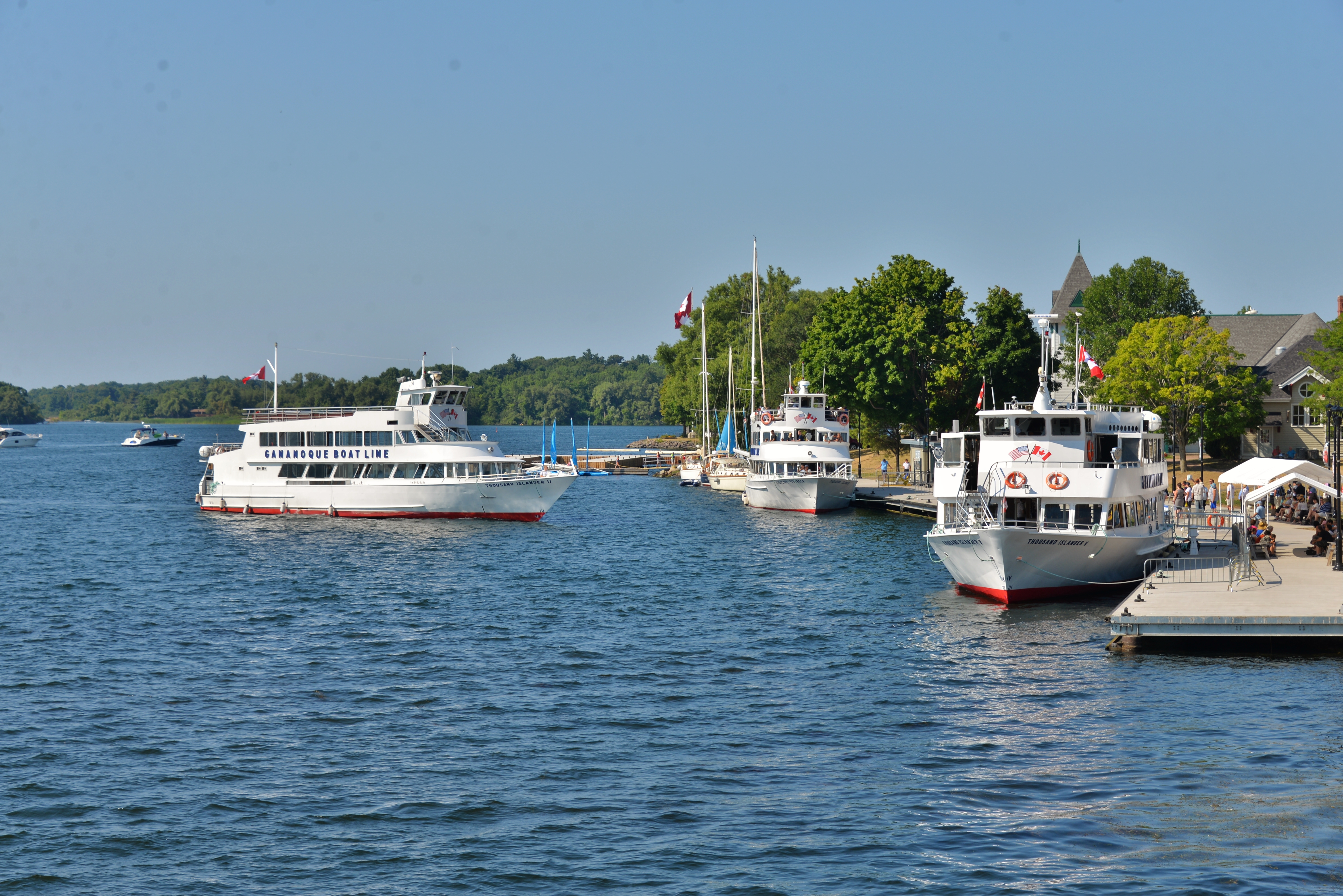 Кораблі туристичної лінії "1000 островів" Thousand Islander ІІ, Thousand Islander та Thousand Islander V коло пристані Ґананокве